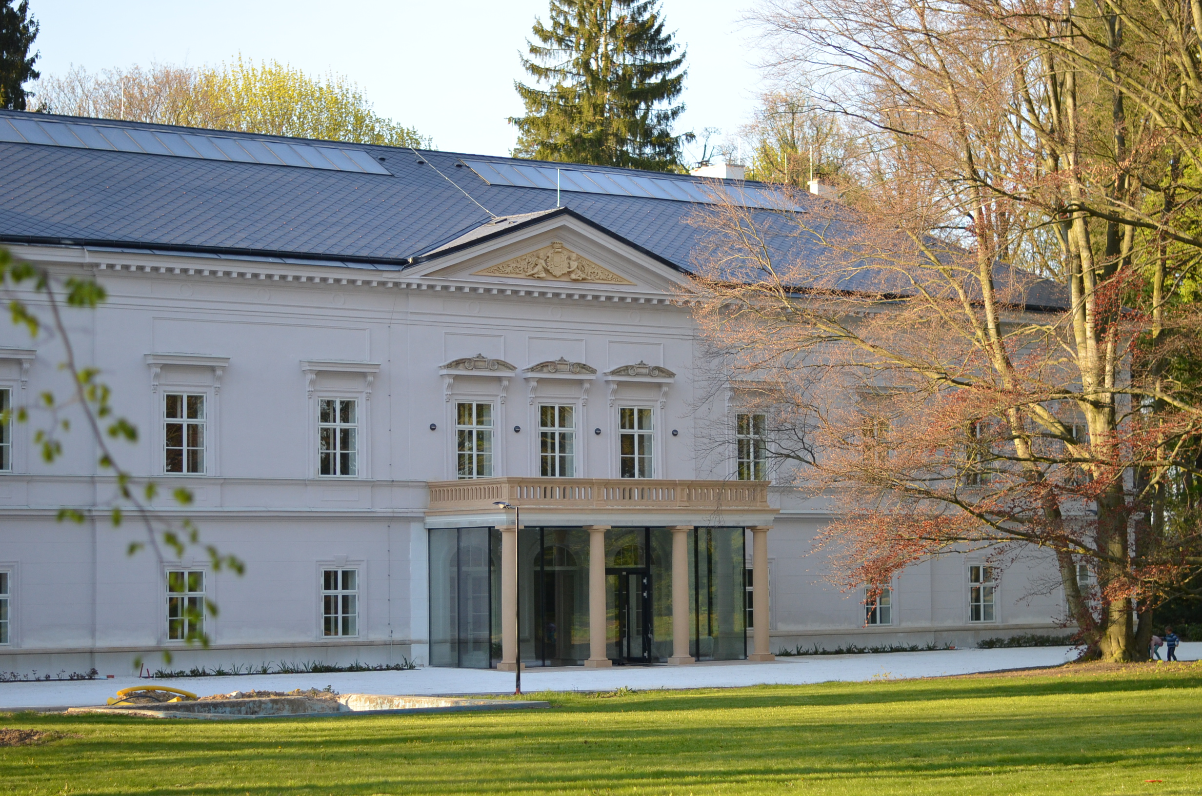 Fotografie zámku Ratměřice, obec Ratměřice